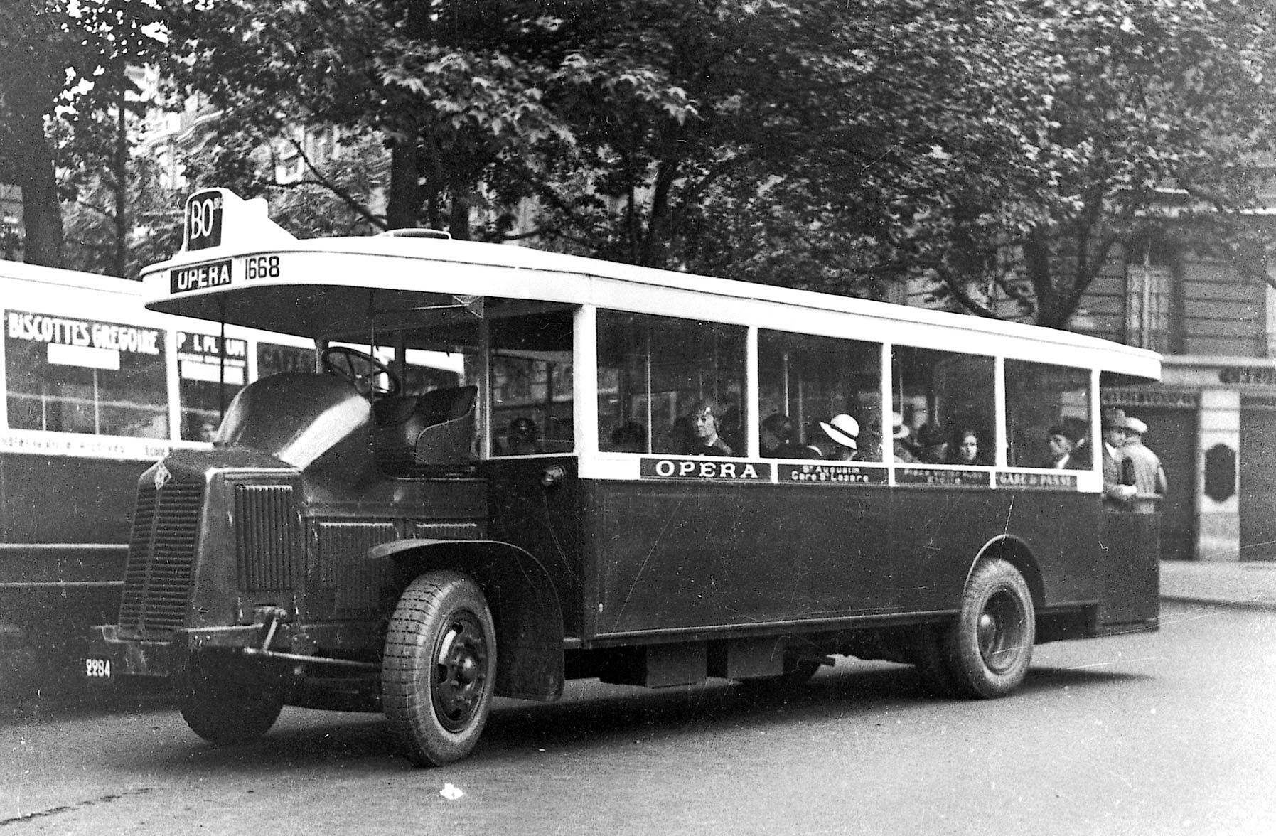 Autobus Renault TN4A, à Paris. Vue prise entre 1931 (date d'apparition de ces autobus) et 1936 (date de leur transformation en TN4B). Auteur inconnu. Collection RATP.